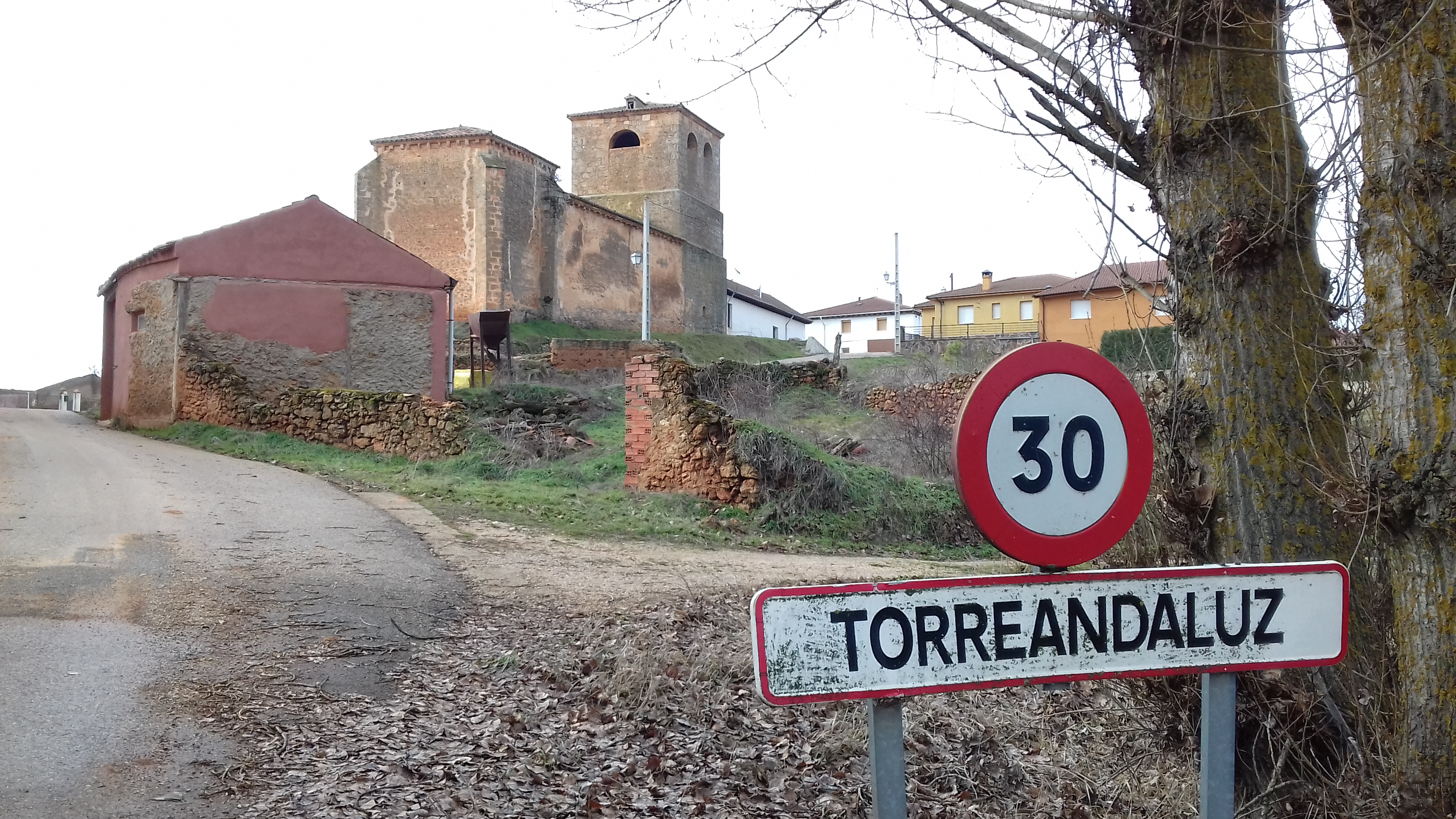 Torreandaluz